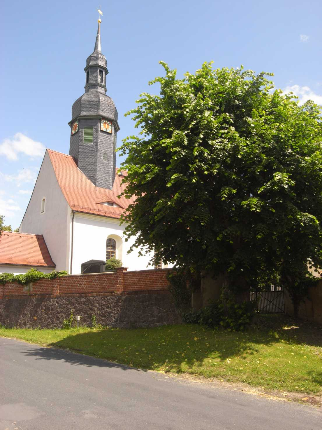 ev.-lutherische Kirche in Ziegenhain (Deutschland, Sachsen)